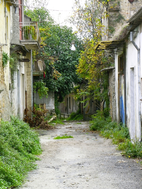 Scorcio del centro storico di Apice, in provincia di Benevento, abbandonato dopo il terremoto del 1962